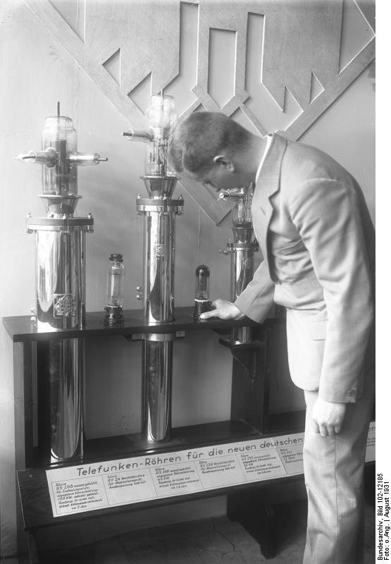 Die Eröffnung der grossen deutschen Funk-Ausstellung in den Ausstellungshallen am Kaiserdamm in Berlin! Riesen-Röhren für die neuen deutschen Gross-Rundfunk-Sender. Ganz rechts die grösste bisher gebaute wassergekühlte 150 Kilowatt leistende Röhre.